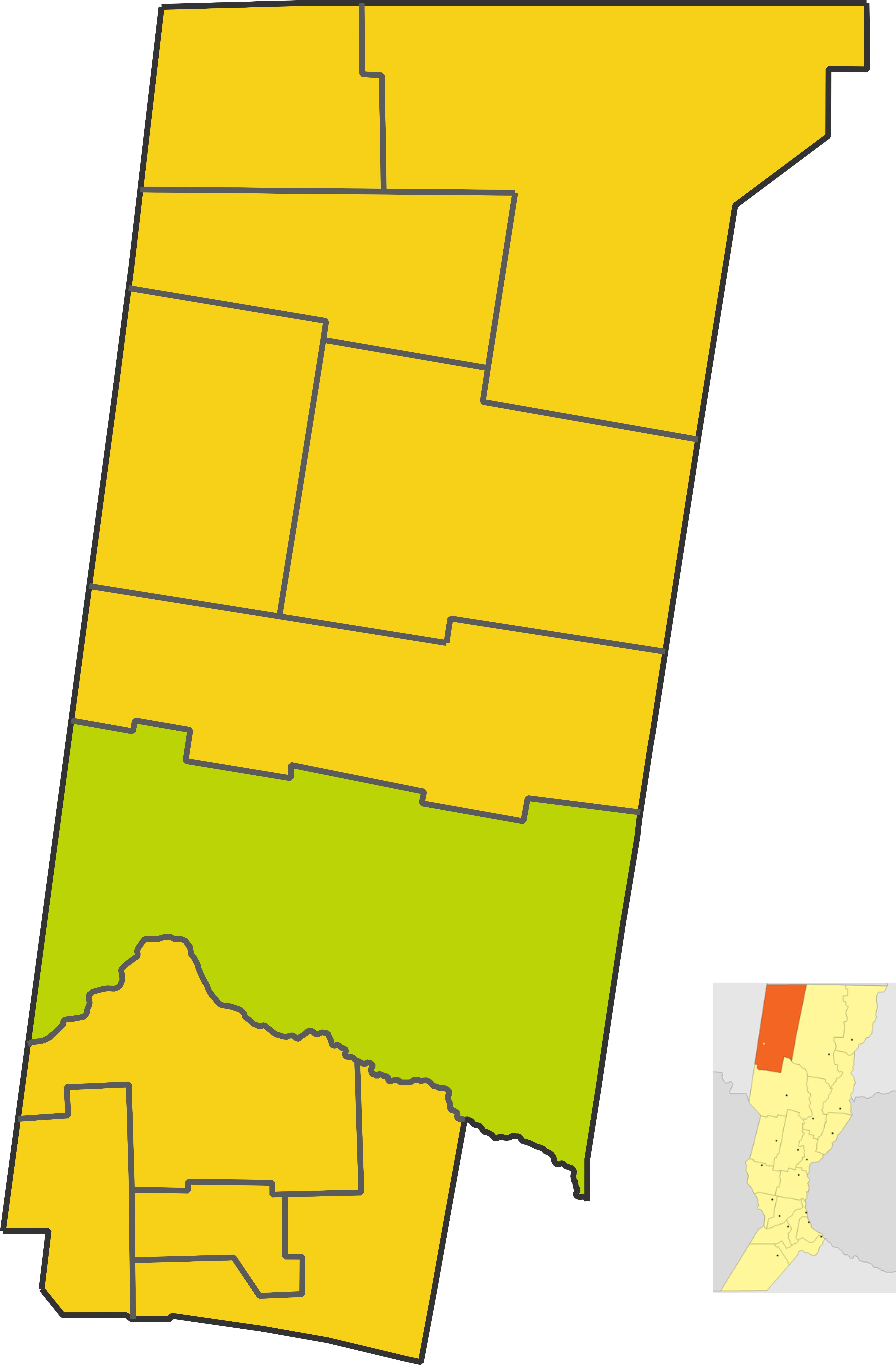 Map of the municipio de Tostado in Nueve de Julio department, Santa Fe province, Argentina